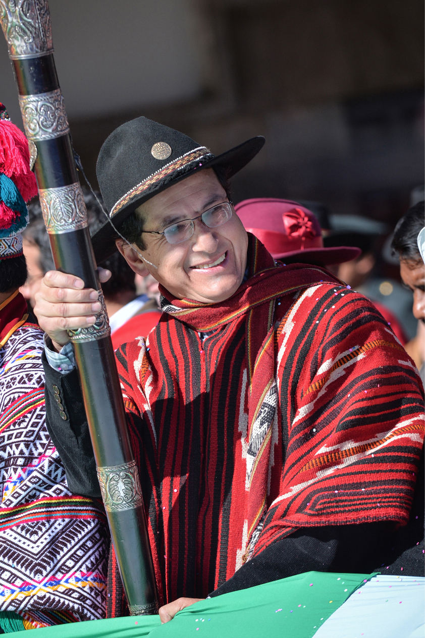 Alcalde en el desfile cívico del Cusco 2016